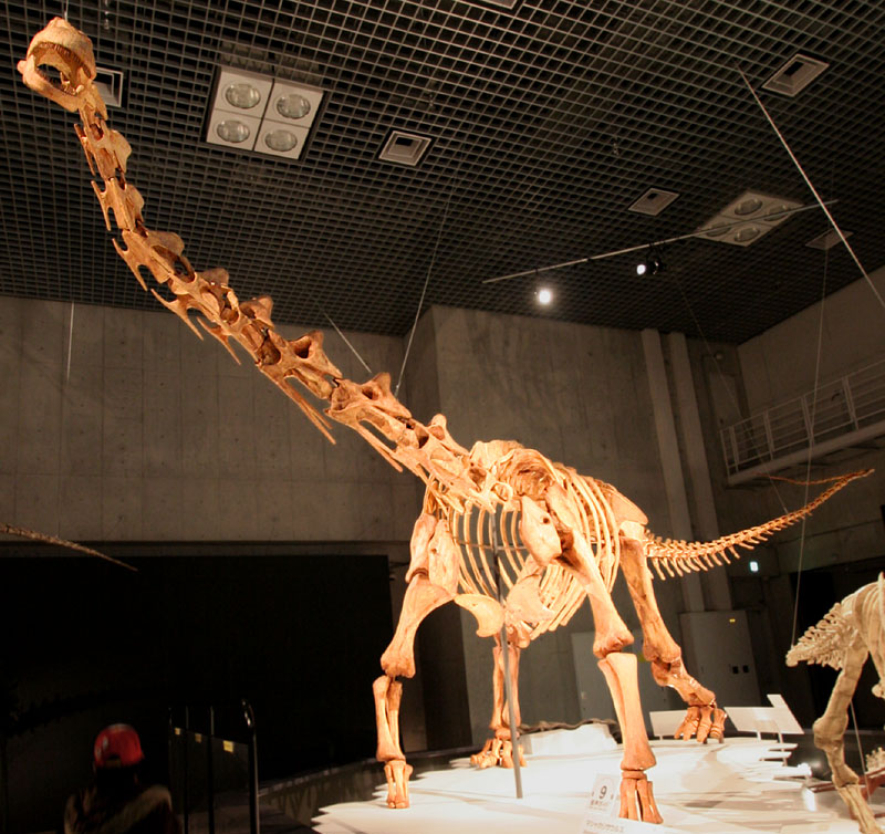 Maxakalisaurus - 01